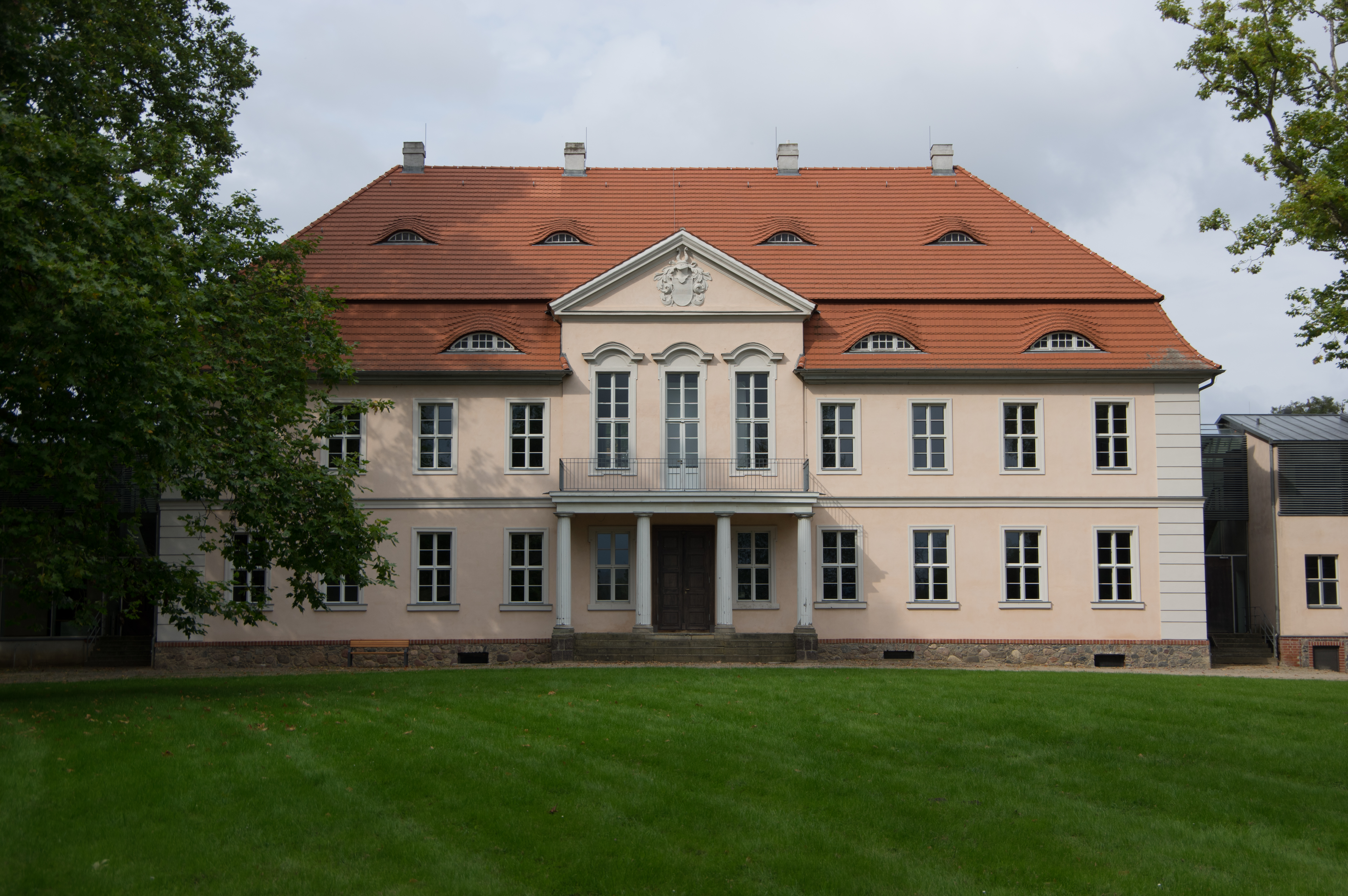 Schwedt/Oder, Ortsteil Criewen in Brandenburg. Das Schloss oder Herrenhaus Criewen wurde in der heutigen Form ab 1818 erbaut.